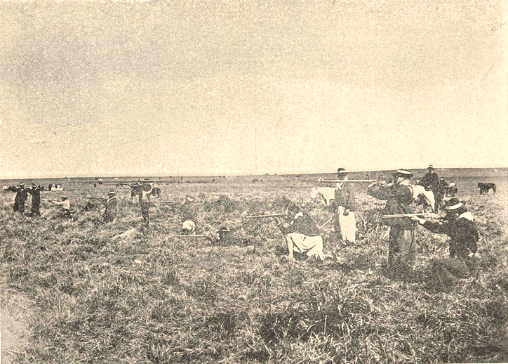 Guerrillas de las Fuerzas Nacionalistas en la Revolución de 1897 en Uruguay